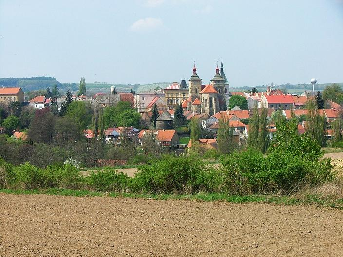 Panorama miasta Kourim w Czechach.